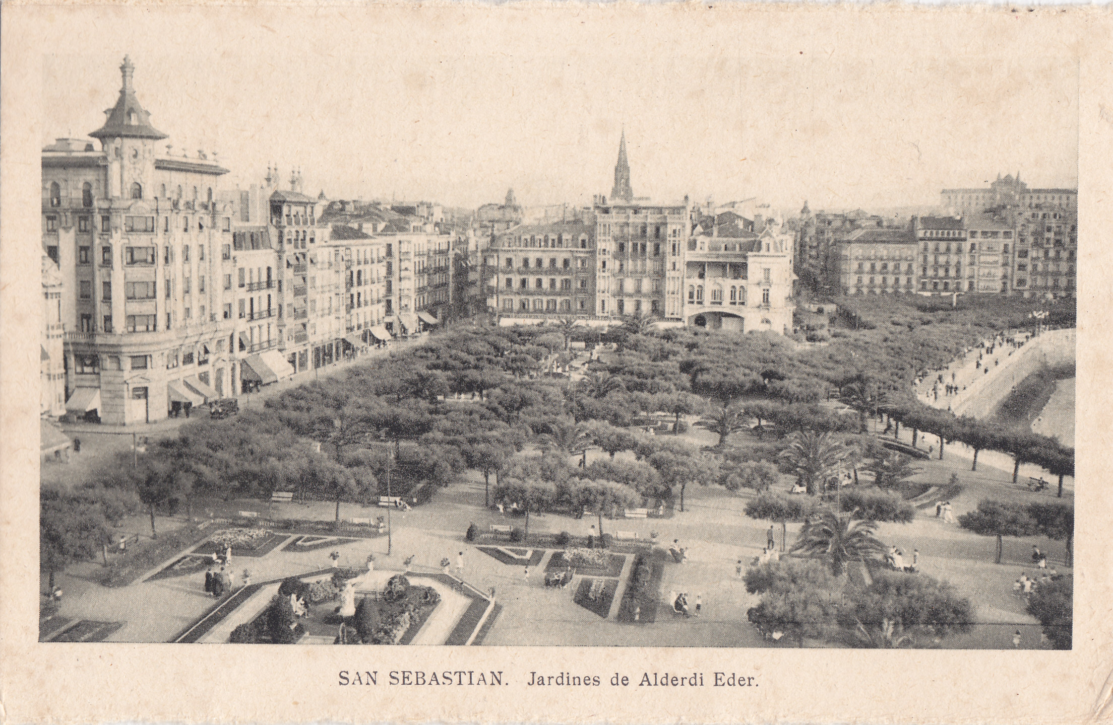 San Sebastian, Espanha, inicio do Séc. XX, Jardines de Alderdi Eder, Arquivo de Villa Maria, Angra do Heroísmo, Açores.